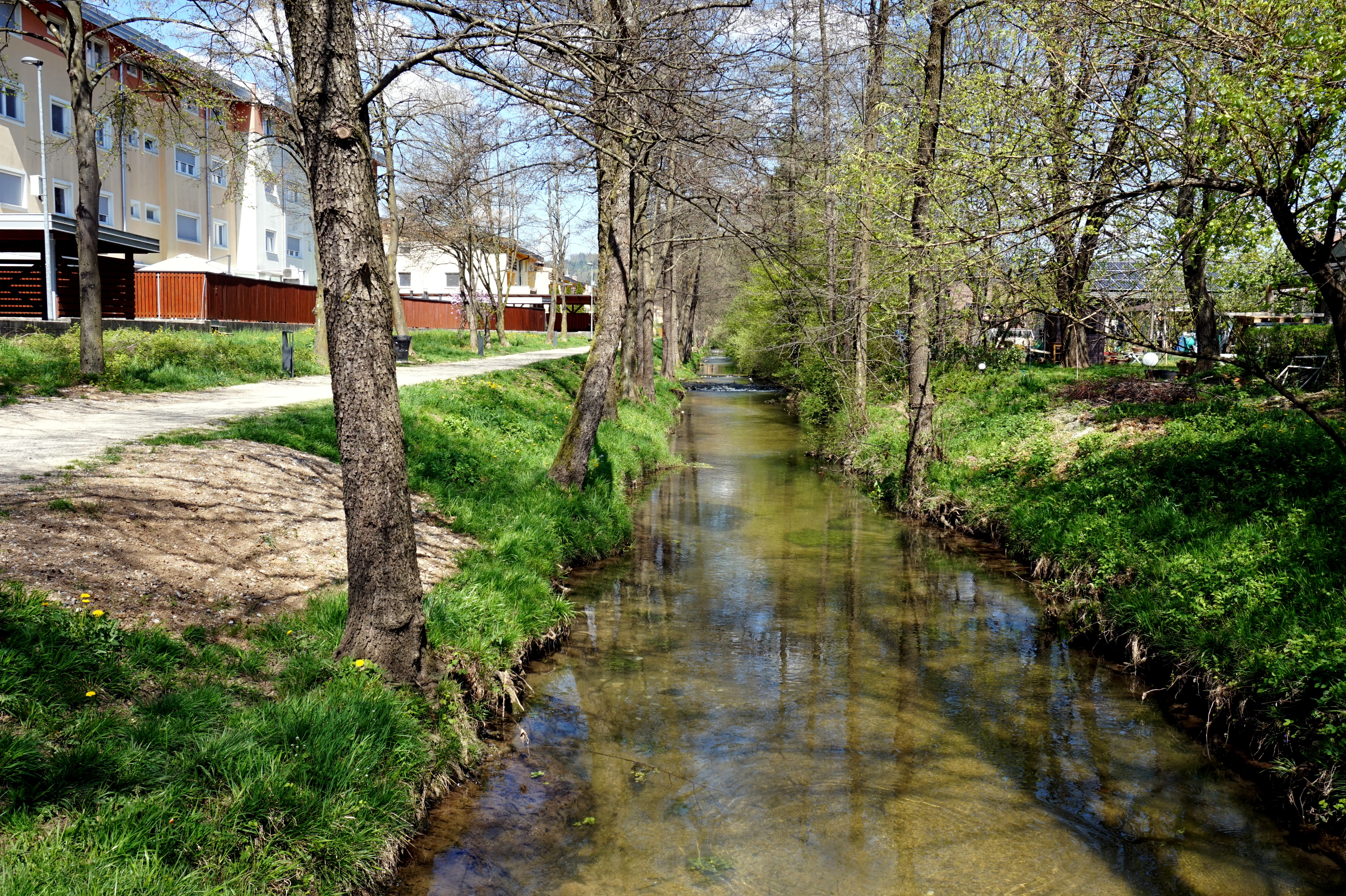 Potok Grosupeljščica v Grosupljem